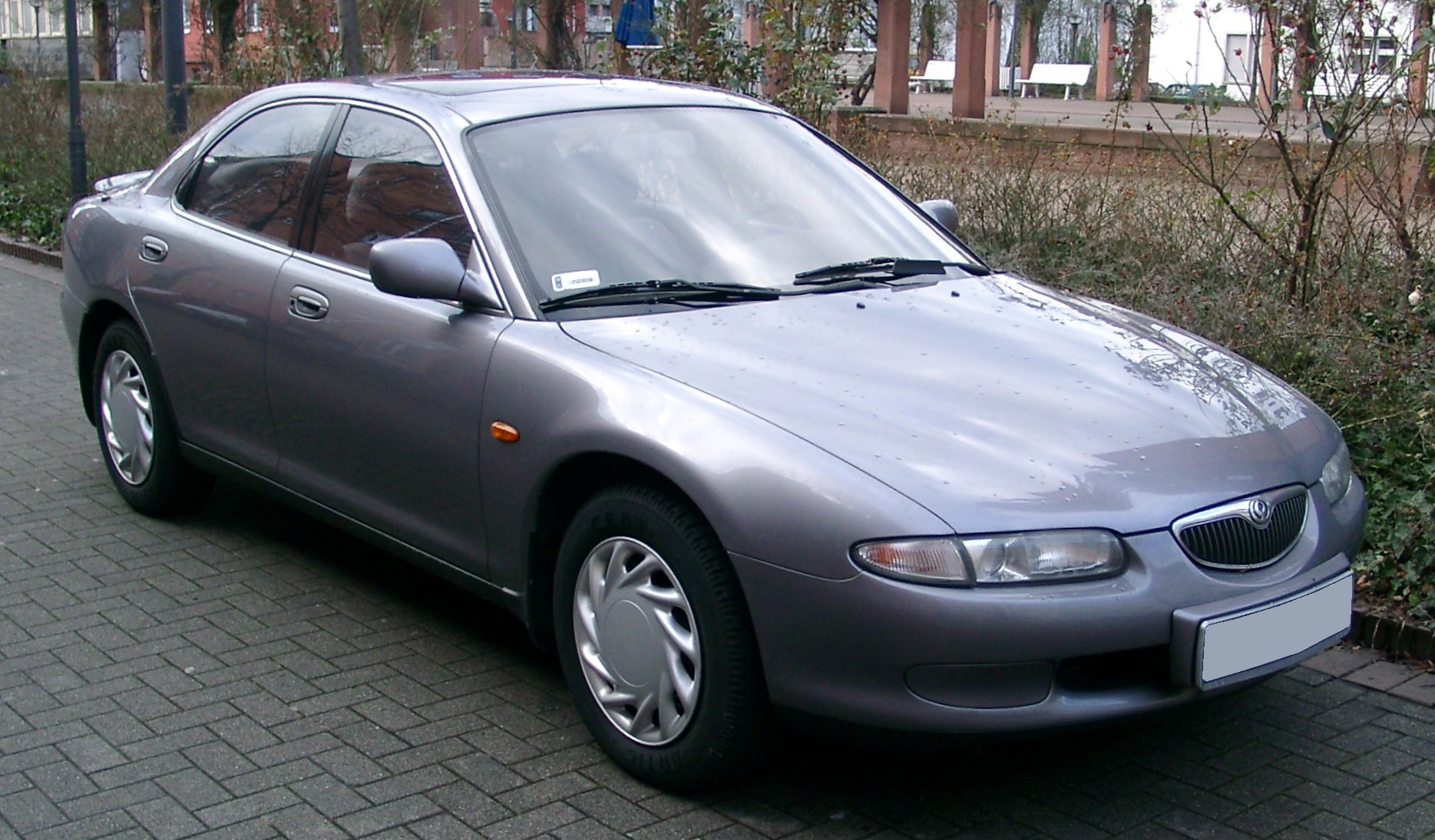 Mazda Xedos 6